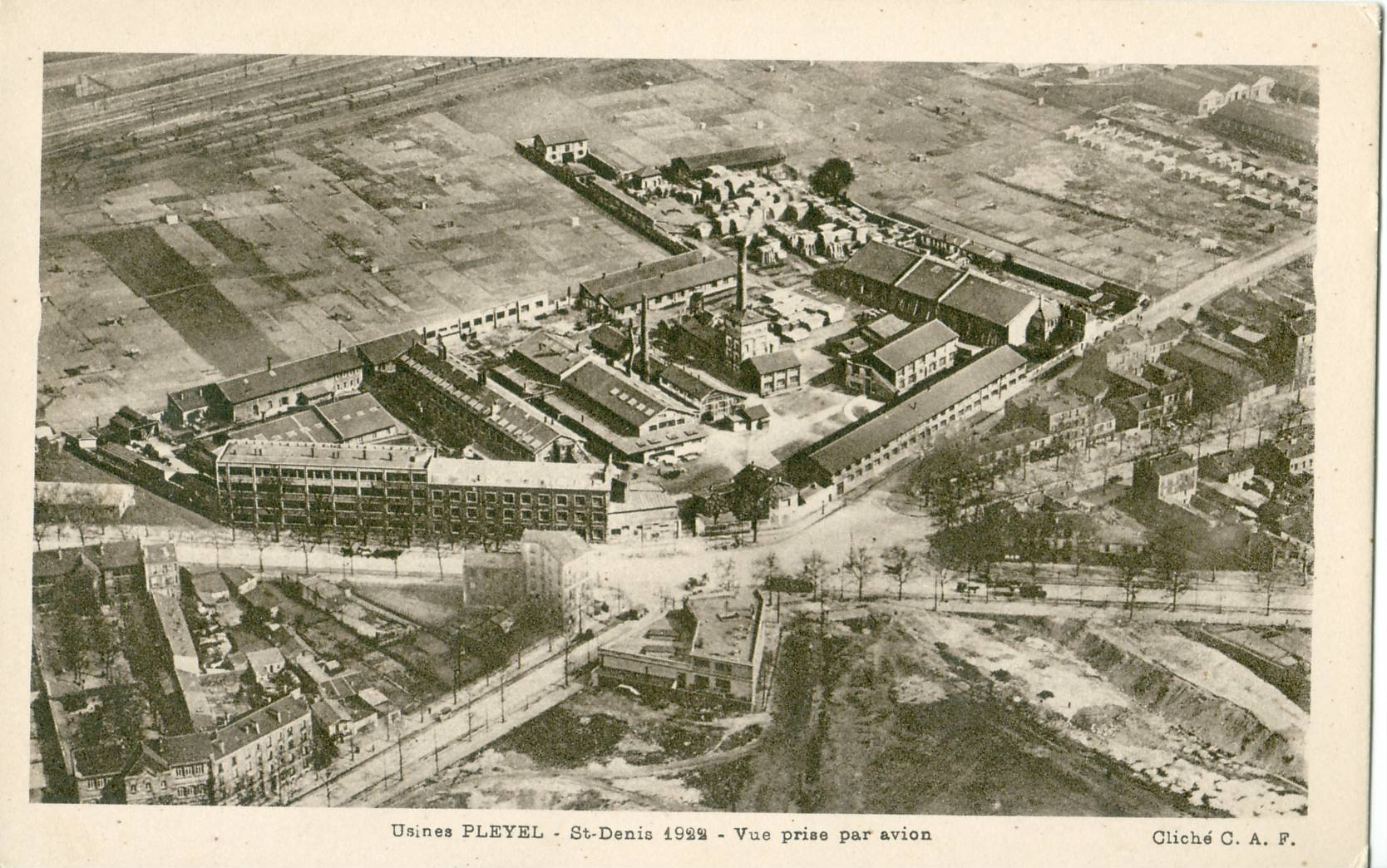 Carte postale ancienne éditée par CAF Usines Pleyel - SAINT-DENIS 1922 - Vue prise par avion